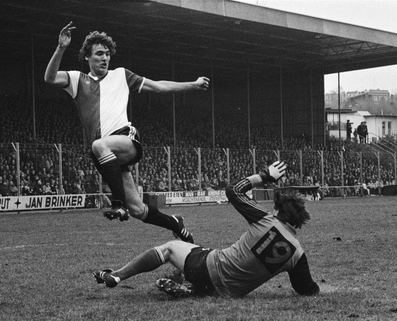 Gerard van der Lem scoort langs keeper Nijhuis.